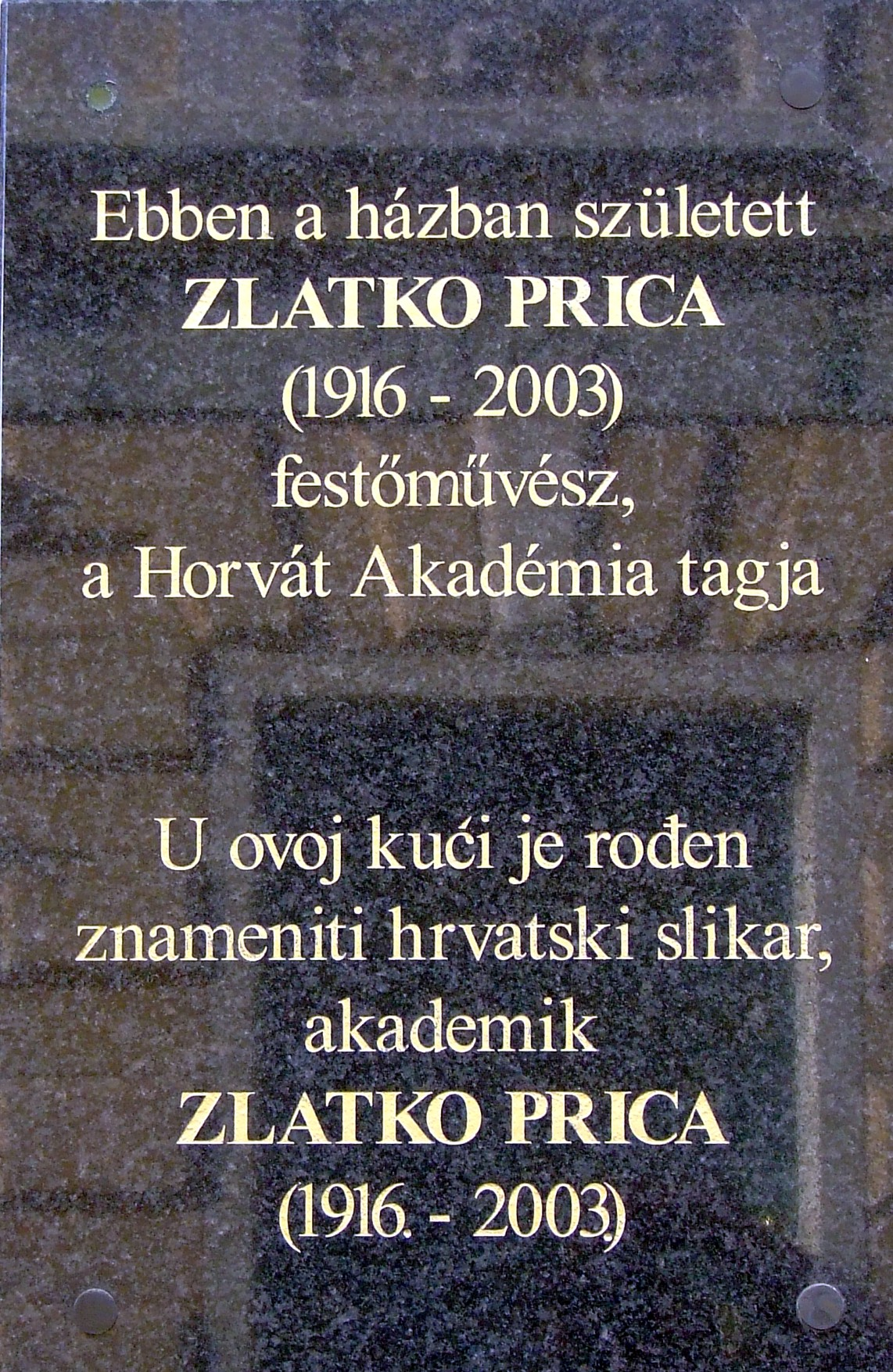 Emléktábla Zlatko Prica pécsi születésű horvát festőművész szülőházának falán